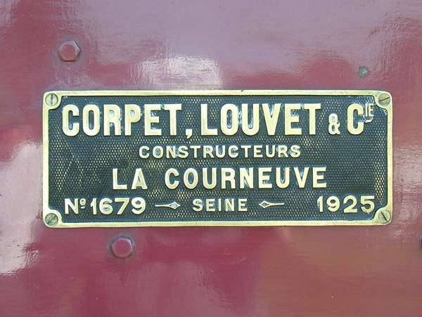 Plaque de constructeur de la locomotive Corpet Louvet ex-Chemins de Fer des Côtes-du-Nord n°36, préservée par le musée des tramways à vapeur et des chemins de fer secondaires français